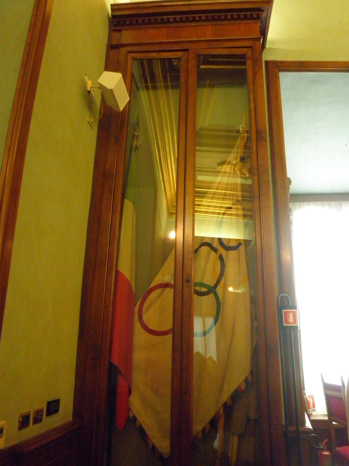 Roma, palazzo senatorio al Campidoglio. Sala delle bandiere. Bandiera delle Olimpiadi di Roma 1960.